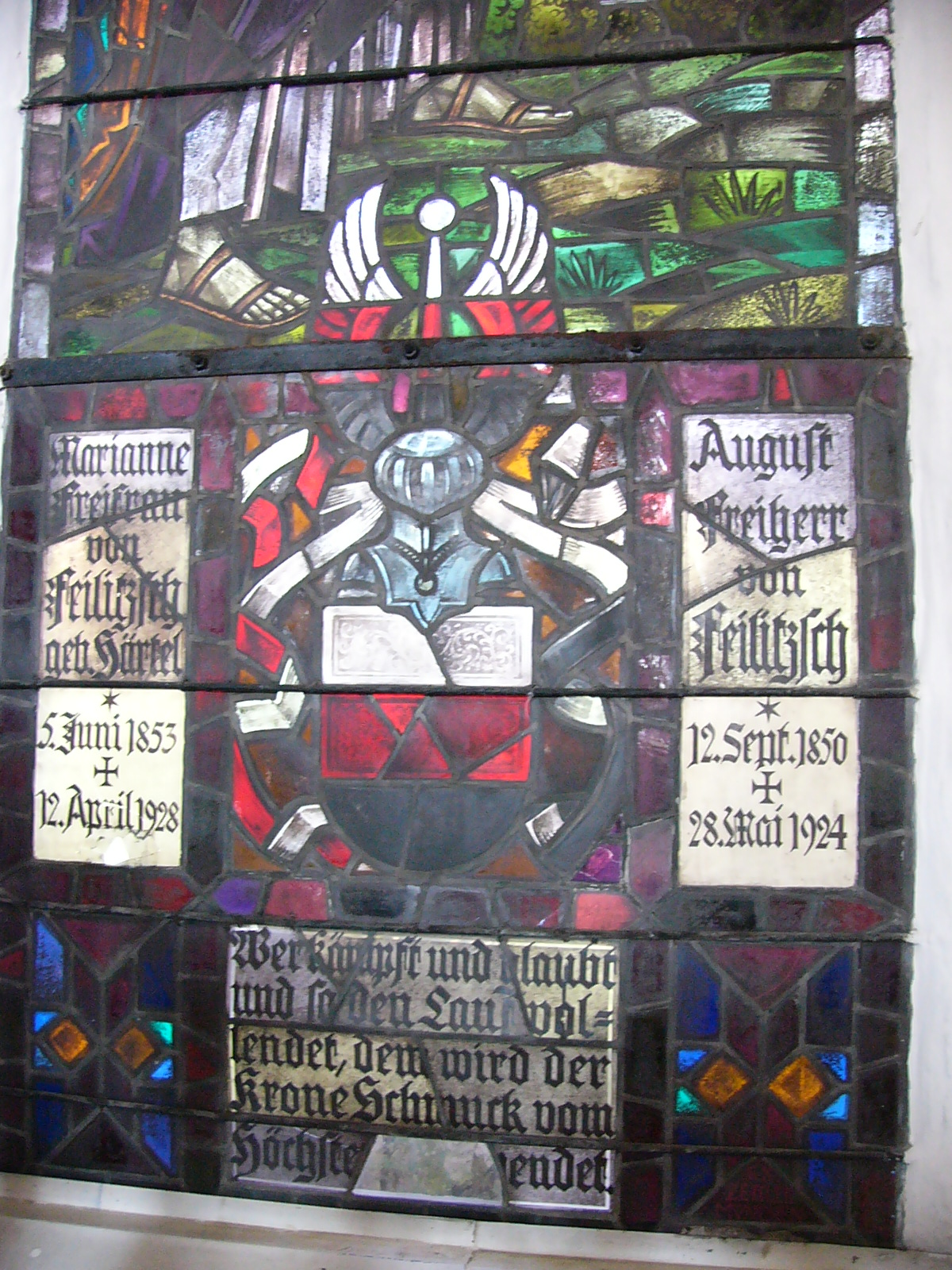 Kirchenfenster in der Trogener Kirche, Wappen der von Feilitzsch